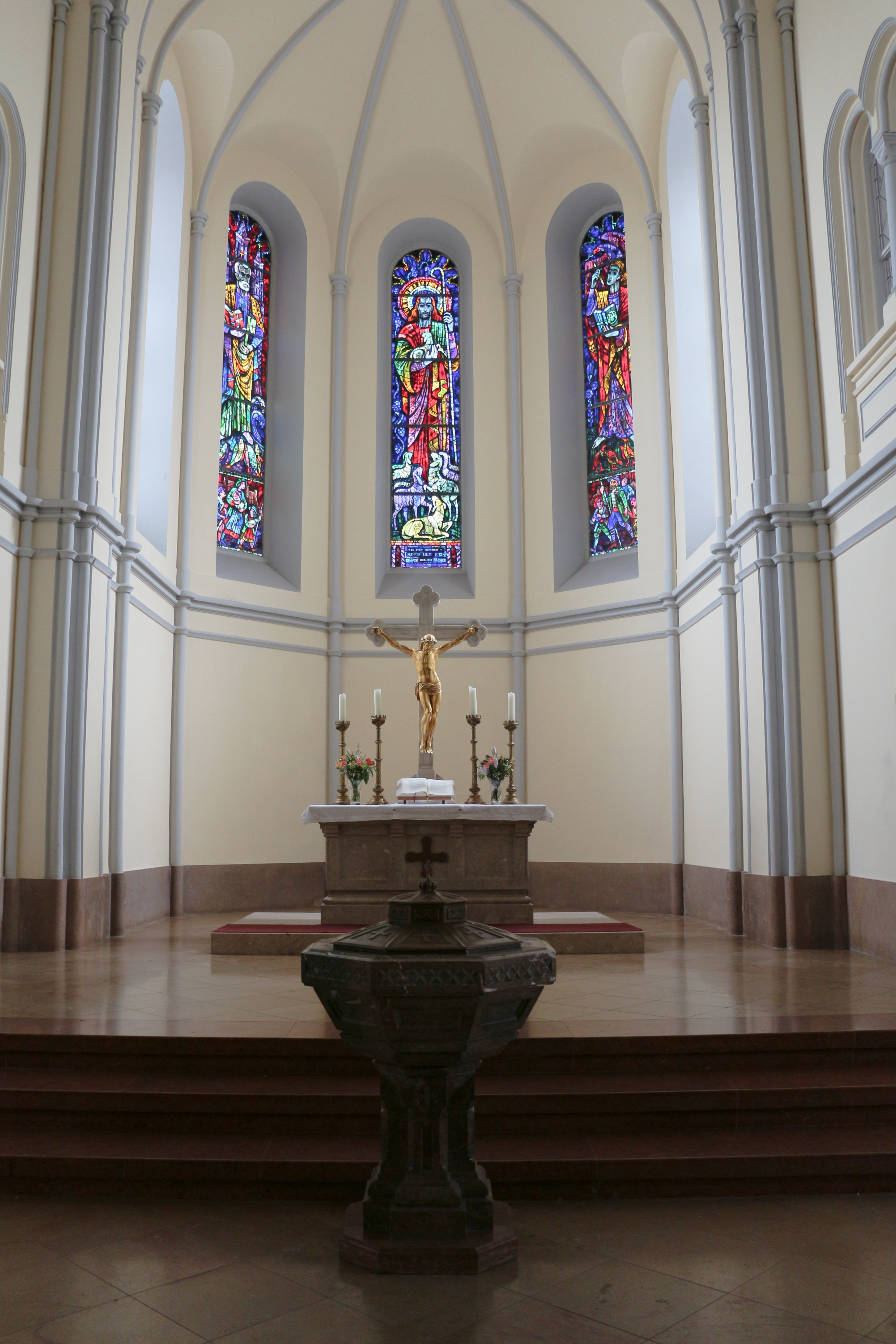 Evangelische Christuskirche, Salzburg, Schwarzstraße, Altarraum.